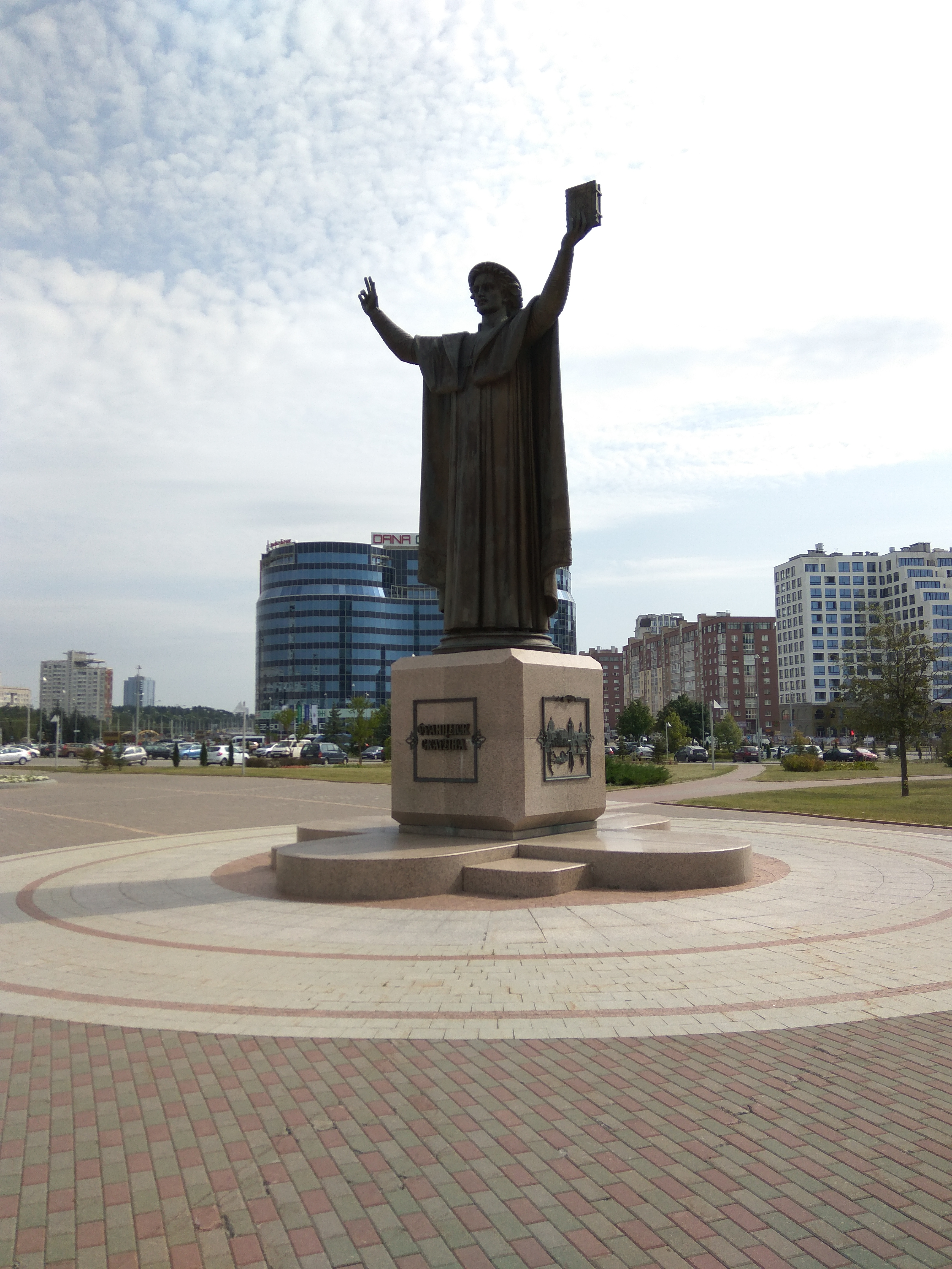 Мінск. Помнік Скарыну каля бібліятэкі